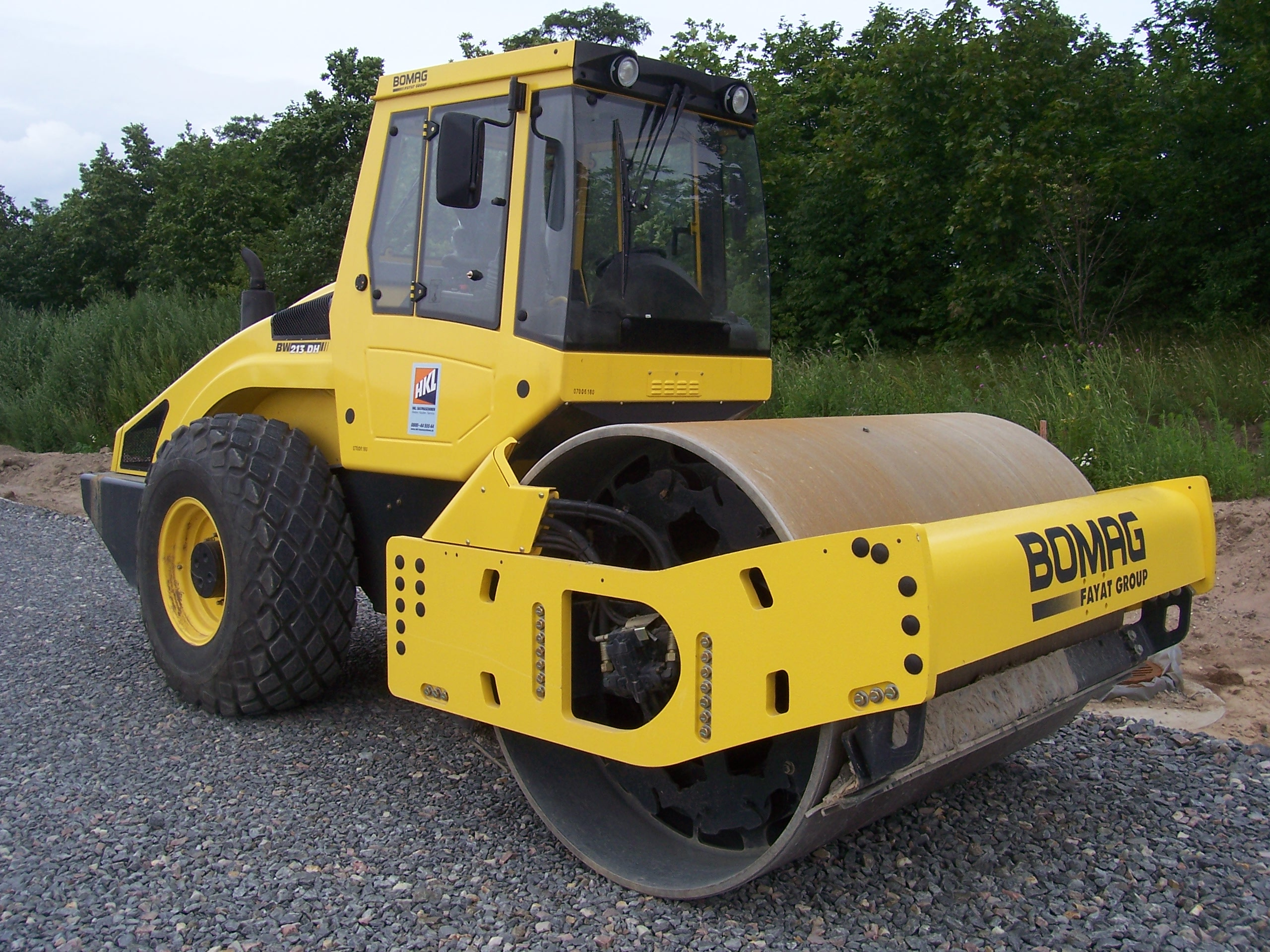 Ein BOMAG Walzenzug Typ BW 213 DH-4, Baujahr 2007, auf einer Baustelle in Mannheim.